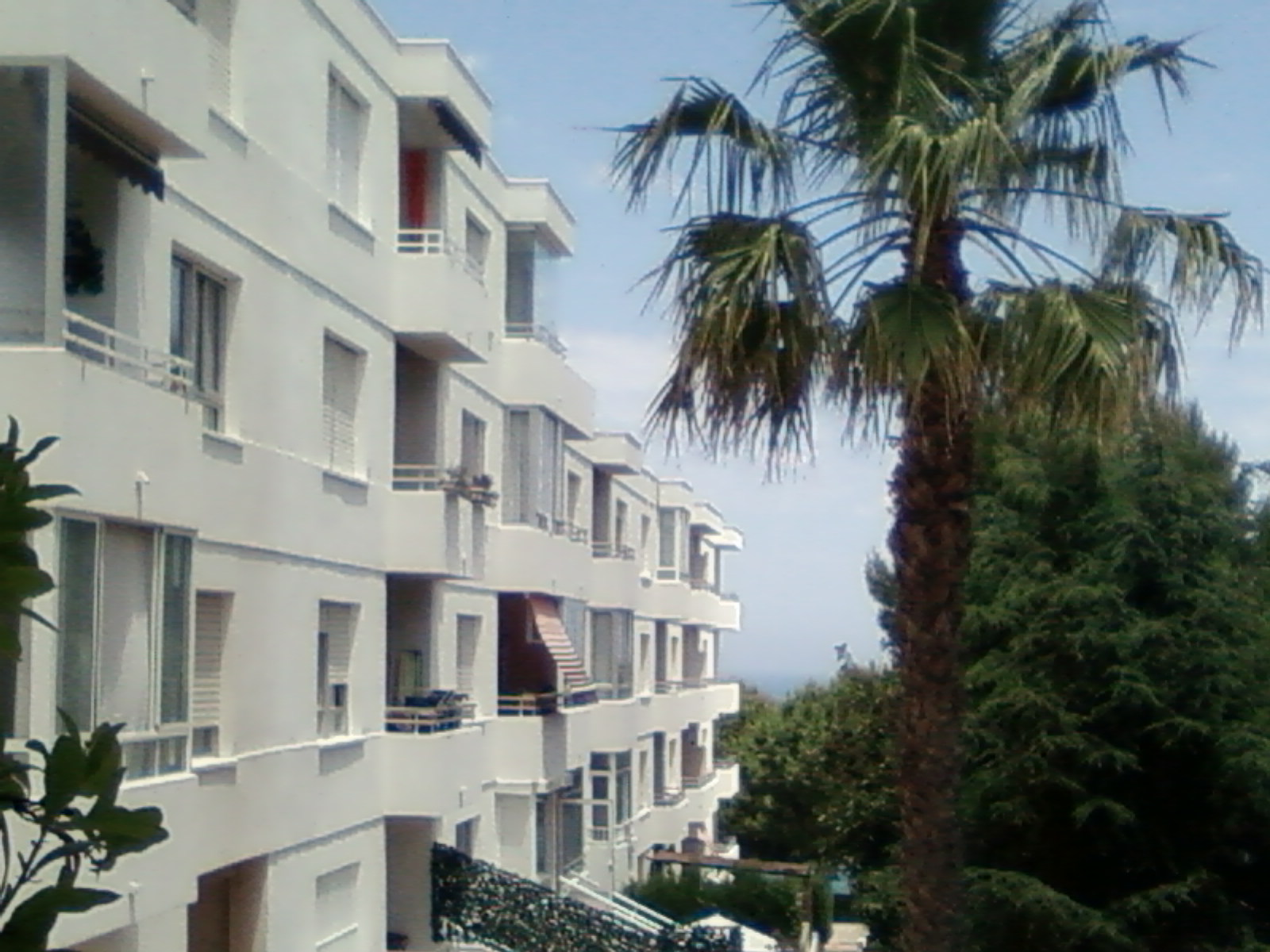 Interior de la urbanización Gran Alacant